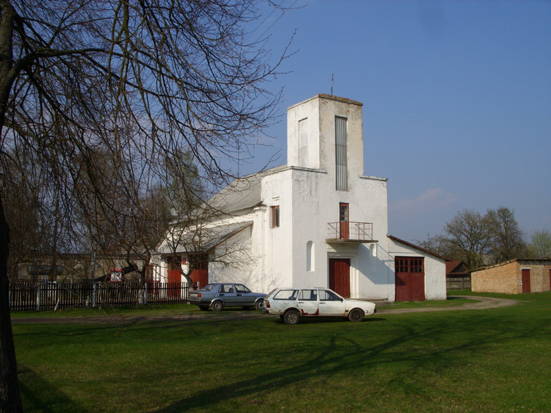 Беларуская (тарашкевіца): Былы касьцёл Сьв. Андрэя Баболі ў Антопалі